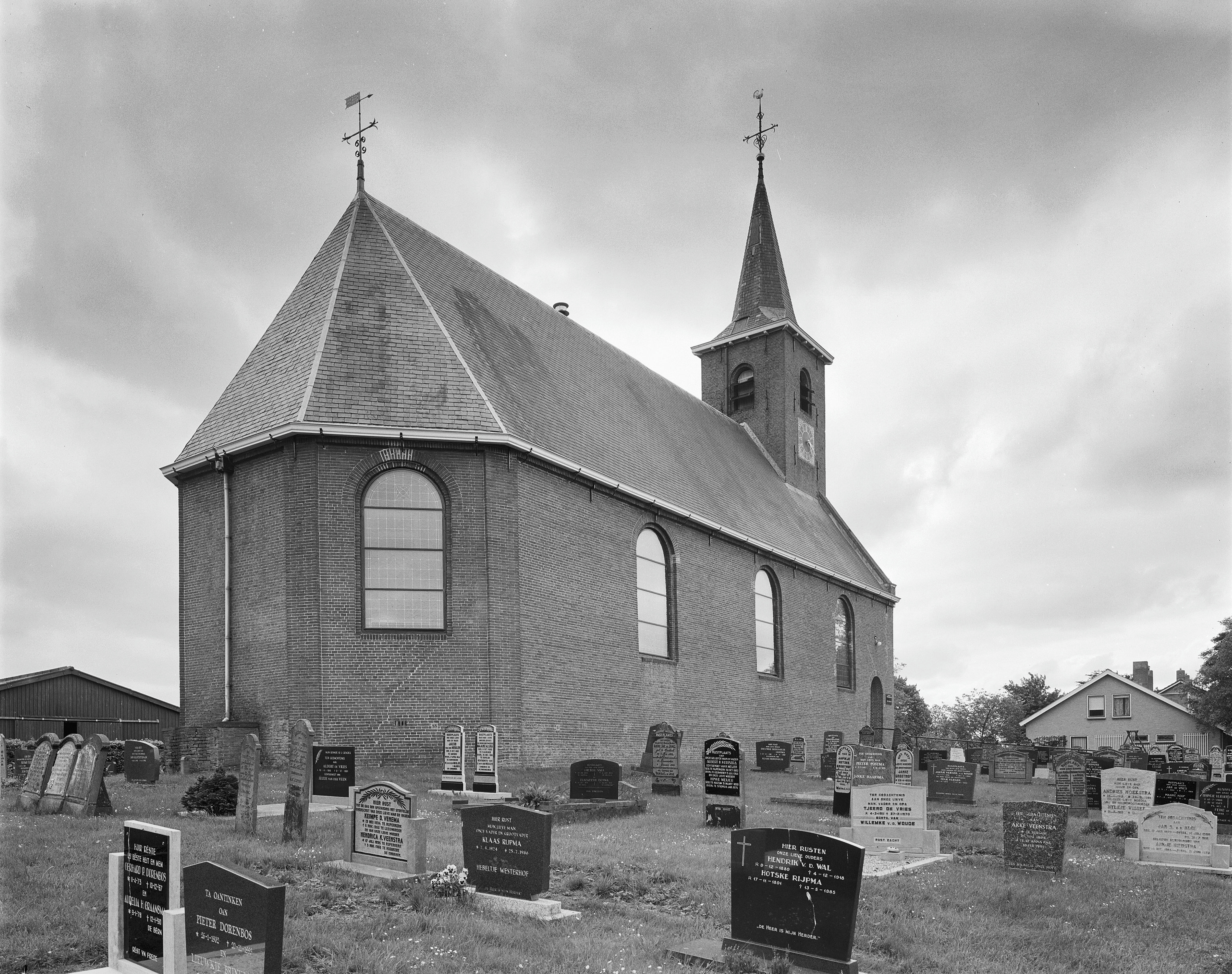 Nederlands Hervormde Kerk: Exterieur NOORDGEVEL, OOSTGEVEL